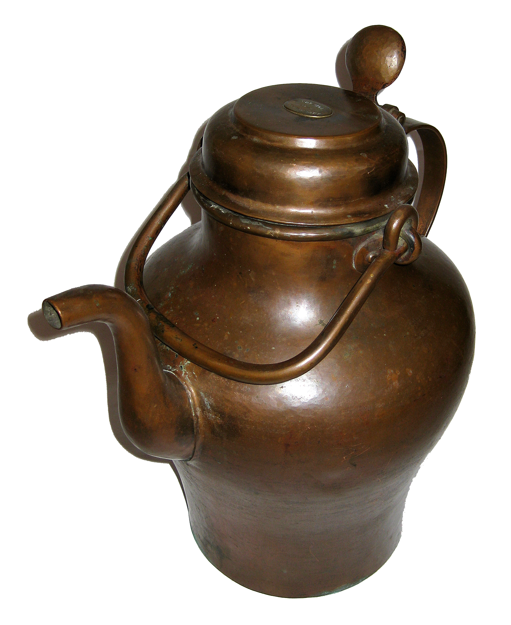 Eine von fünf Bergbierkannen der Knappschaft des Königlichen Steinkohlenwerk Zauckerode um 1845. Vier Kannen (darunter die Abgebildete) wurden durch die Knappschaft selbst beschafft. Eine weitere Kanne mit etwas abweichender Form, wurde der Knappschaft gestiftet. Das Fassungsvermögen beträgt etwa 10 Liter pro Kanne. Vier Kannen befinden sich im Bestand der Städtischen Sammlungen "Haus der Heimat" Freital und sind im Eingangsbereich von Schloß Burgk ausgestellt. Das abgebildete Stück befindet sich in Privatbesitz. Bergbierkannen waren in vielen Knappschaften als Symbol des Wohlstandes der Knappschaft zu finden. Sie wurden bei Bergparaden mitgeführt und waren im Rahmen von feierlichen Anlässen in Gebrauch.